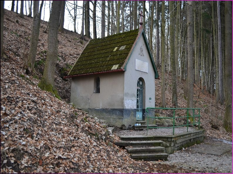 Mariánská kaple v Boušíně